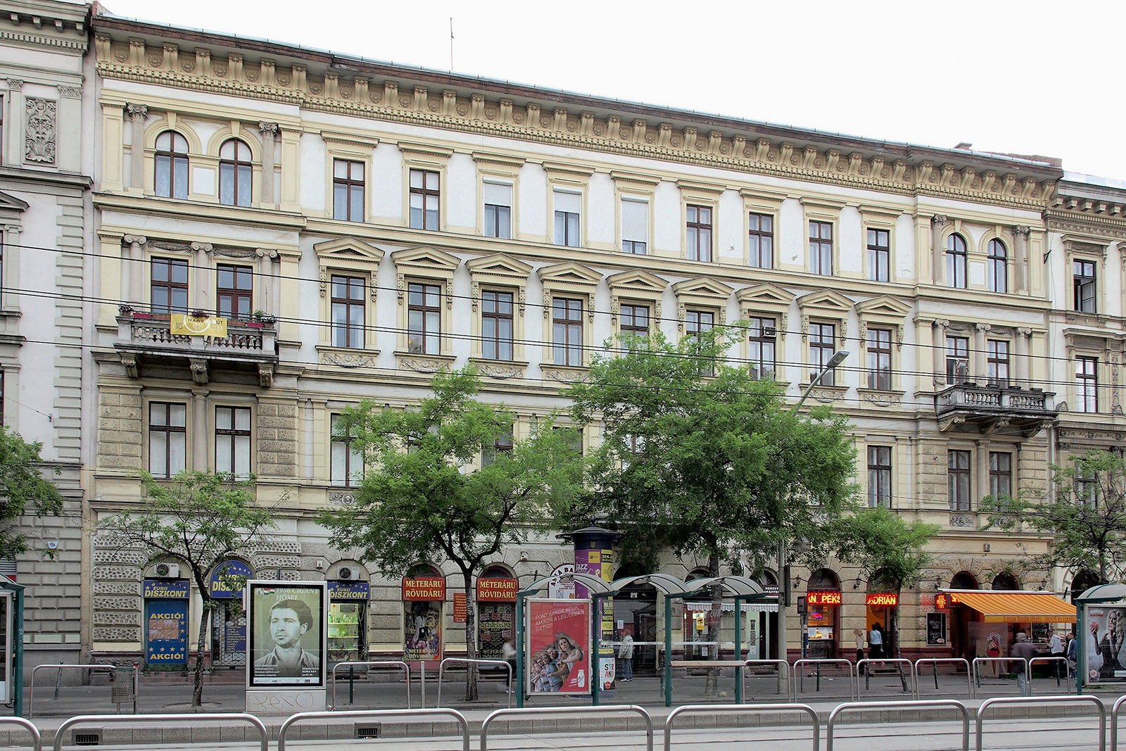 József körút 48., Mendl István egykori bérháza, 1872-1873-ban Hauszmann Alajos tervei szerint épült.